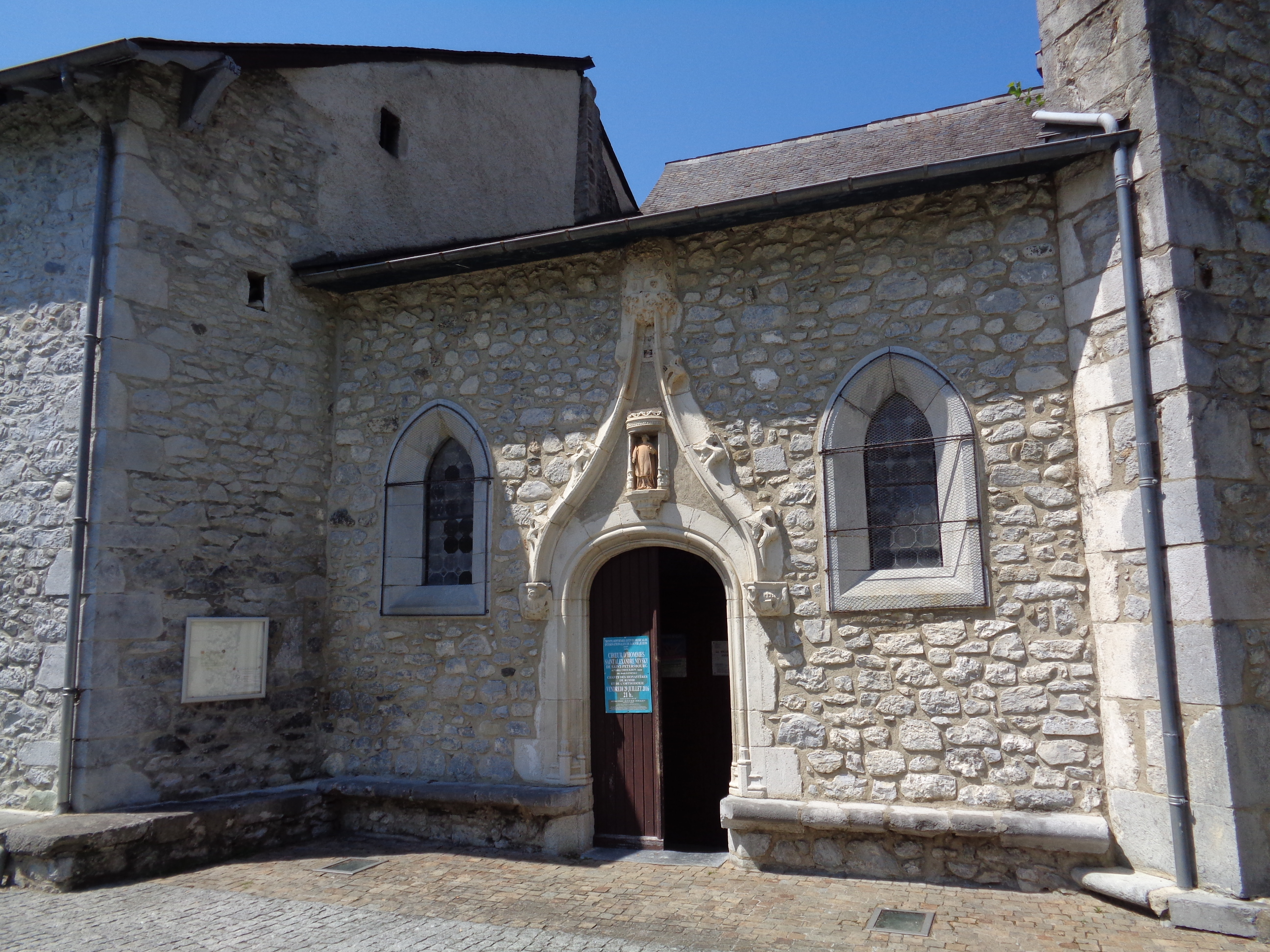 Porche gothique